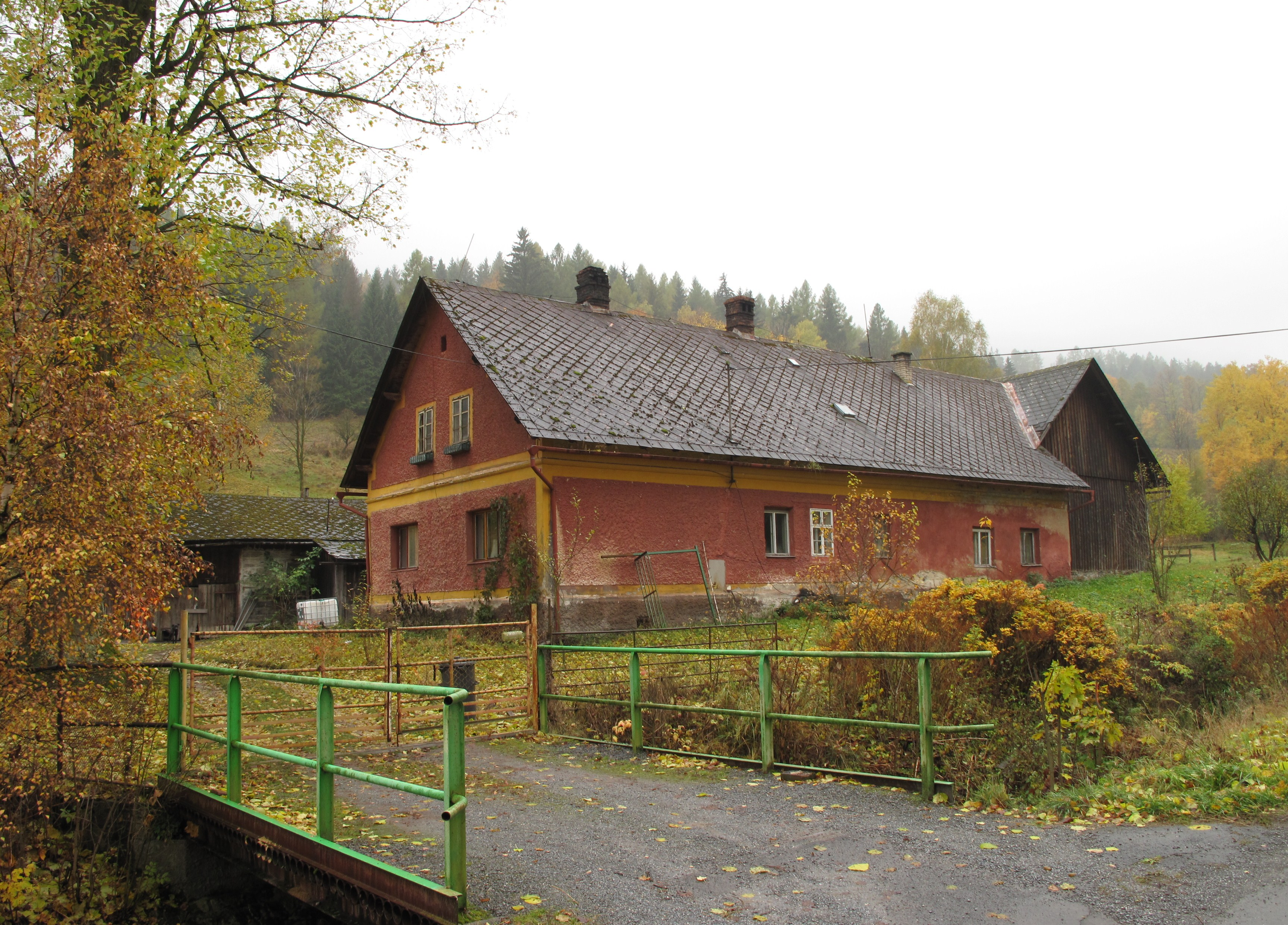 Dlouhá Voda. Okres Bruntál, Česká republika.